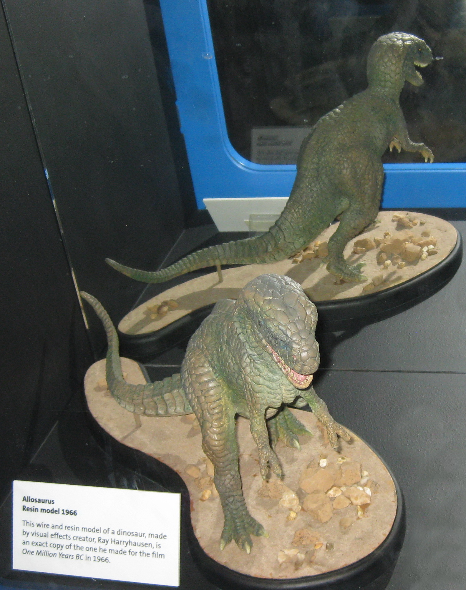 Sculpture du dinosaure Allosaurus créée par Ray Harryhausen pour l'animation en volume du film Un million d'années avant J.C. (1966).